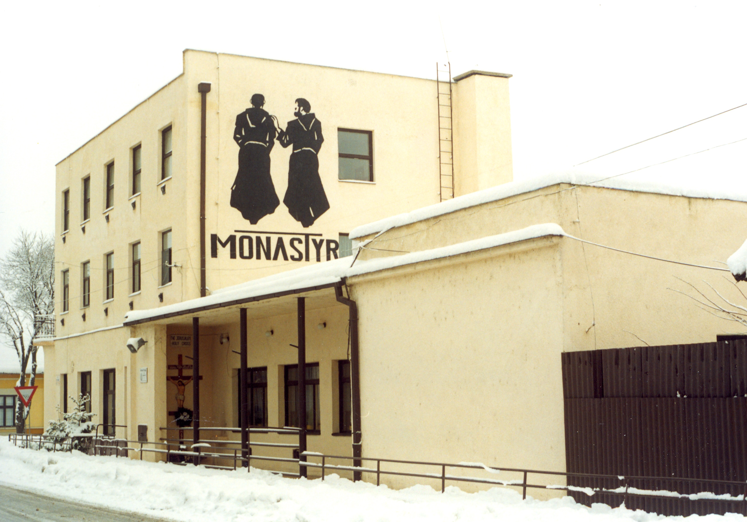 Monastier oo. baziliánov v Trebišove r. 1999. Photo taken by Jozafát Vladimír Timkovič, OSBM